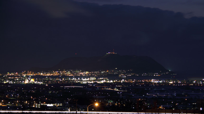 函館裏夜景